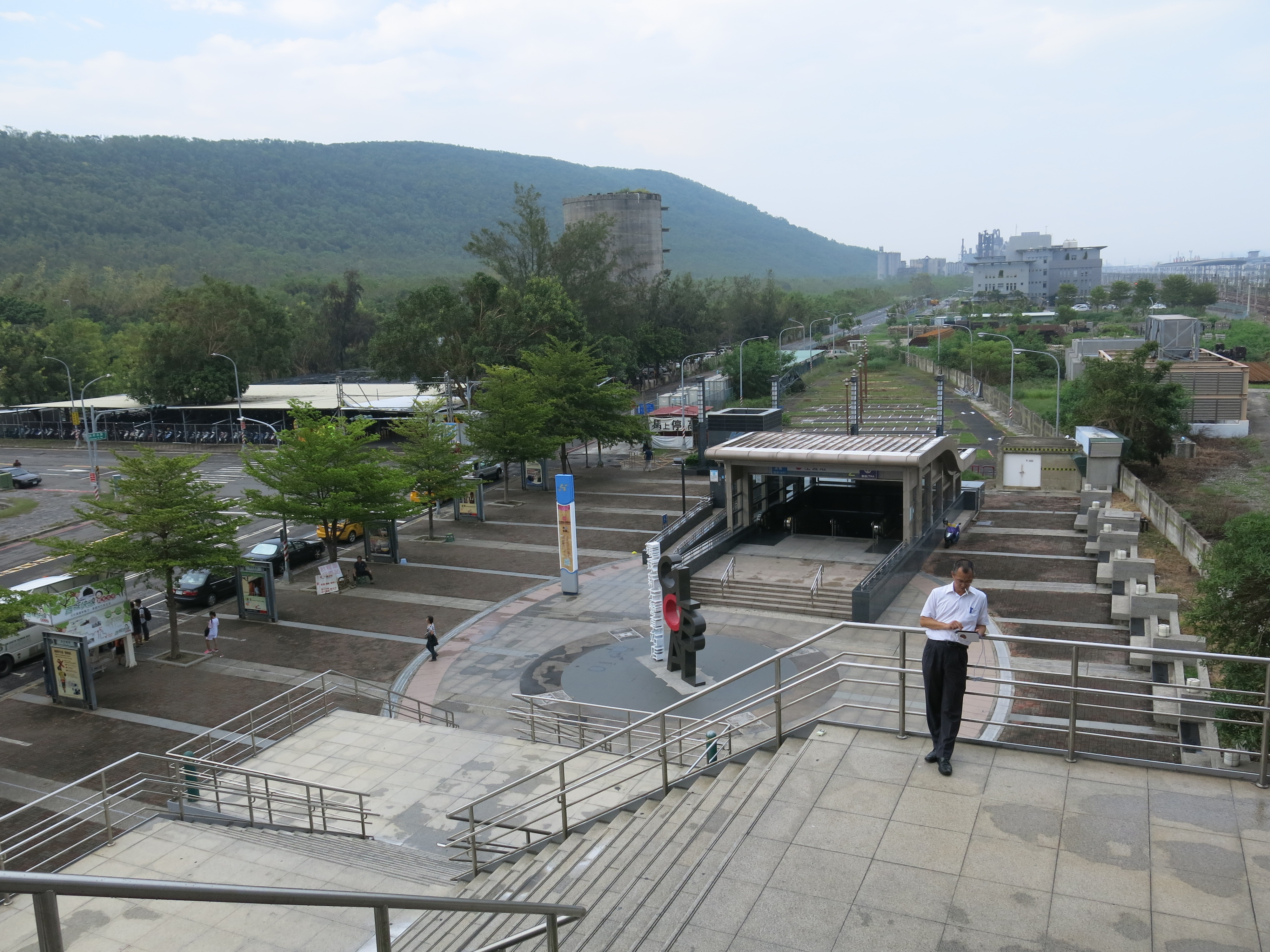 中文（台灣）: 高雄捷運左營站2號出口。